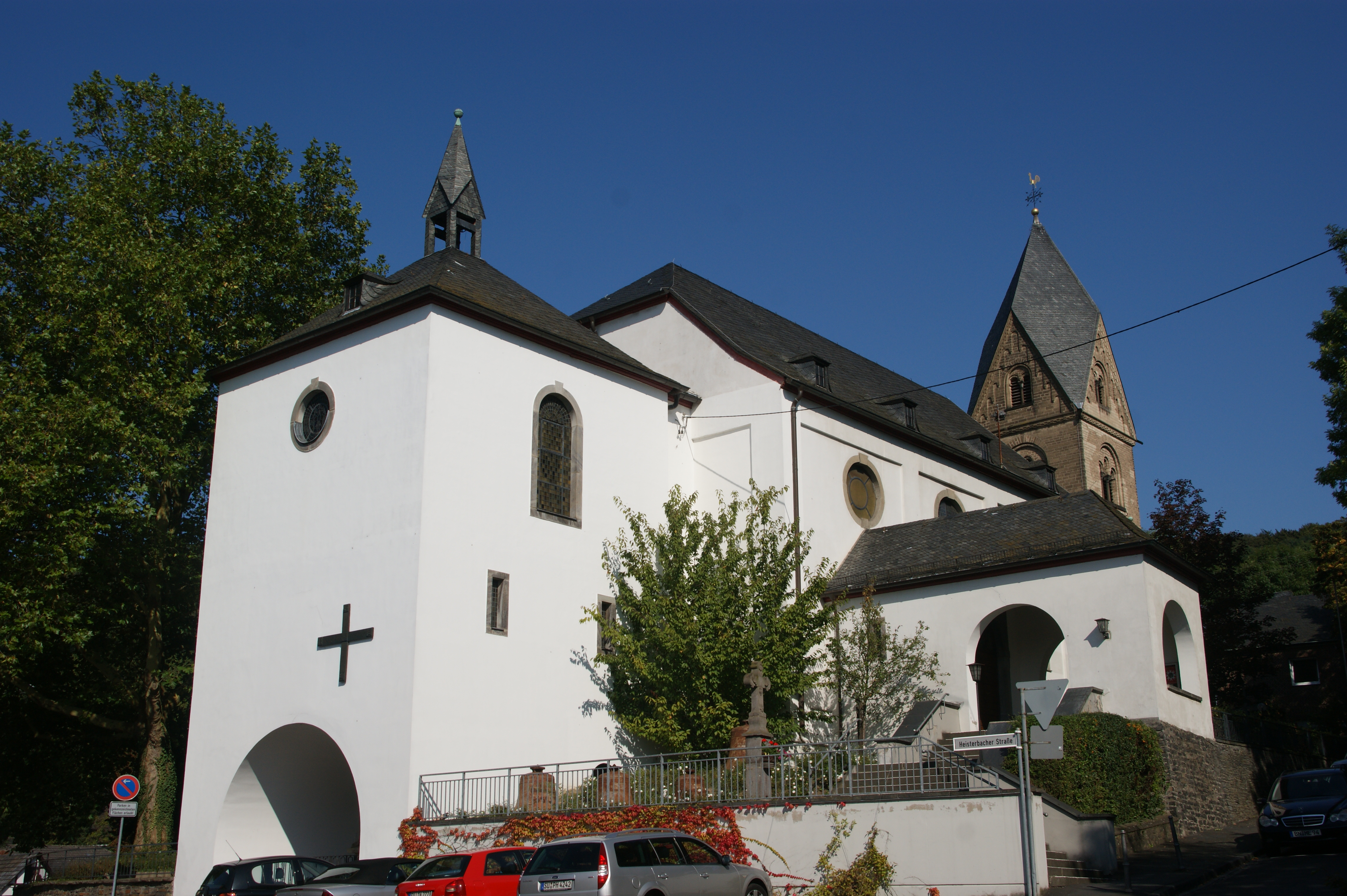 Katholische Kirche Sankt Laurentius in Königswinter-Oberdollendorf: Ansicht von der Ecke Heisterbacher Straße/Rennenbergstraße